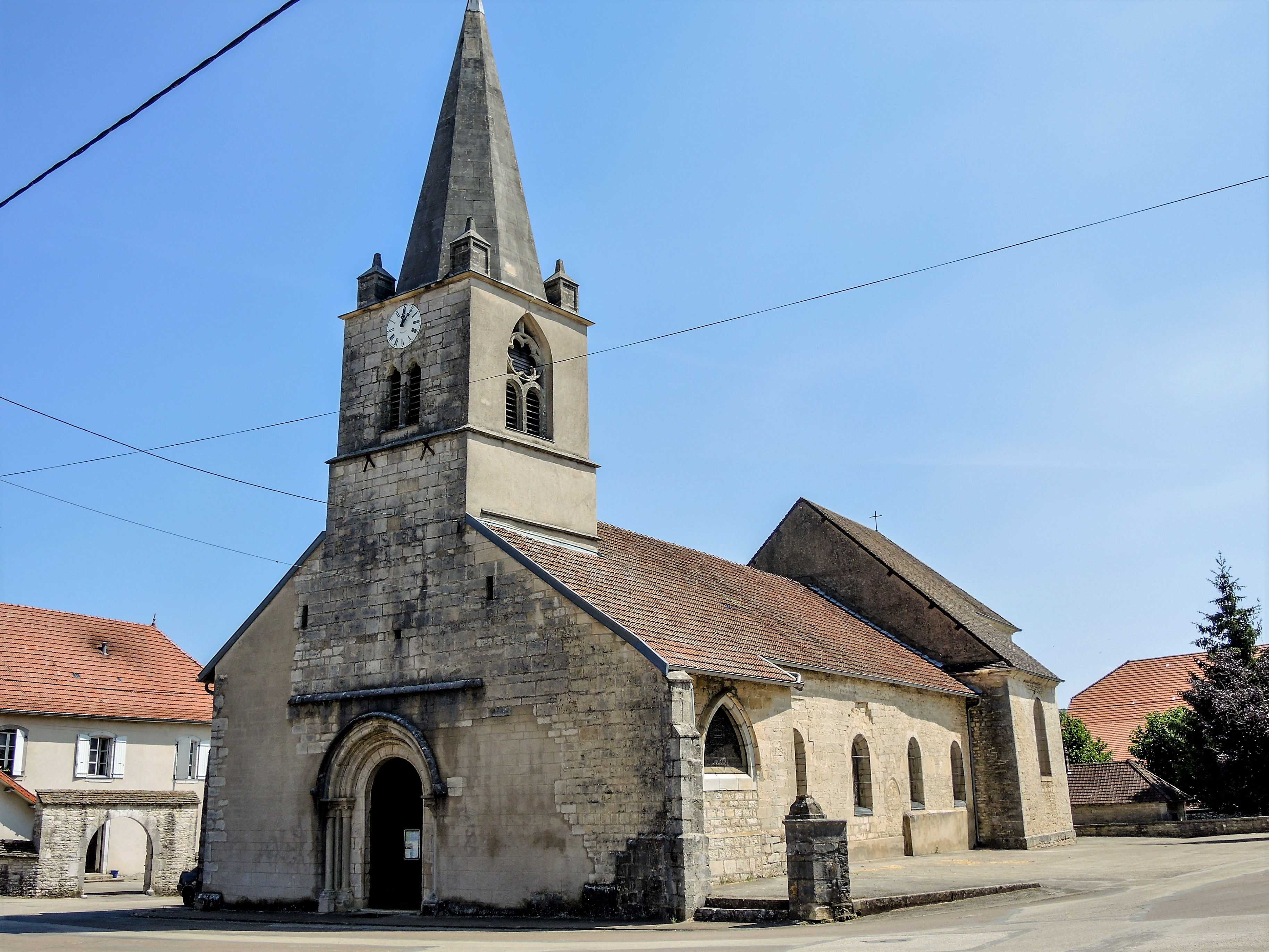 Eglise Saint-Léger de Fertans. Doubs